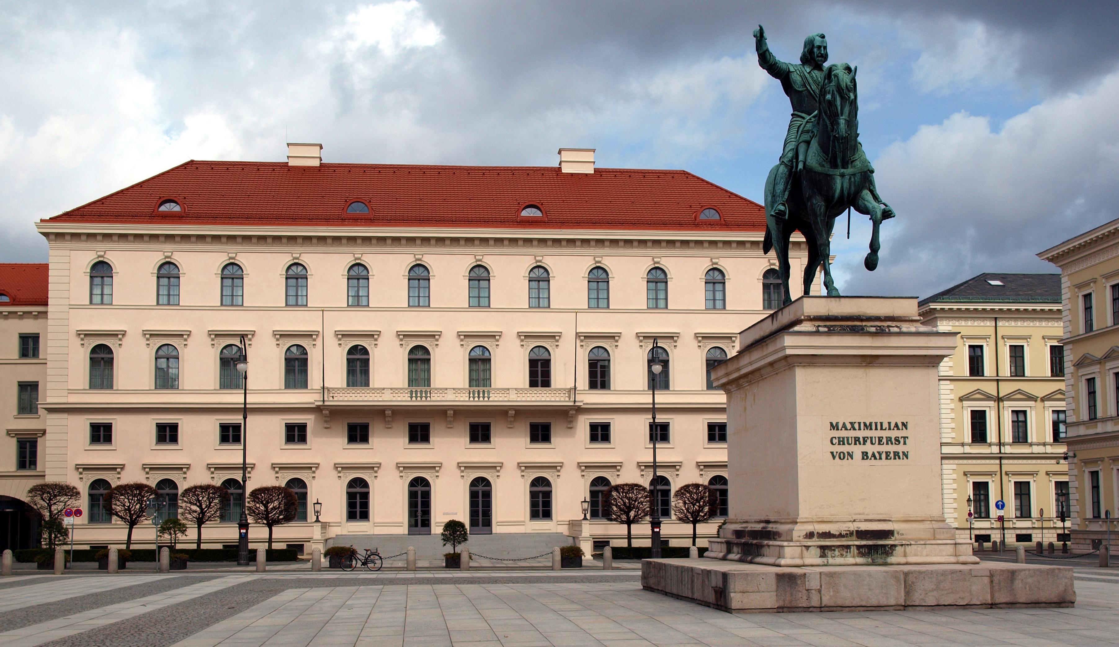 Palais Ludwig Ferdinand in Munich, HQ of Siemens